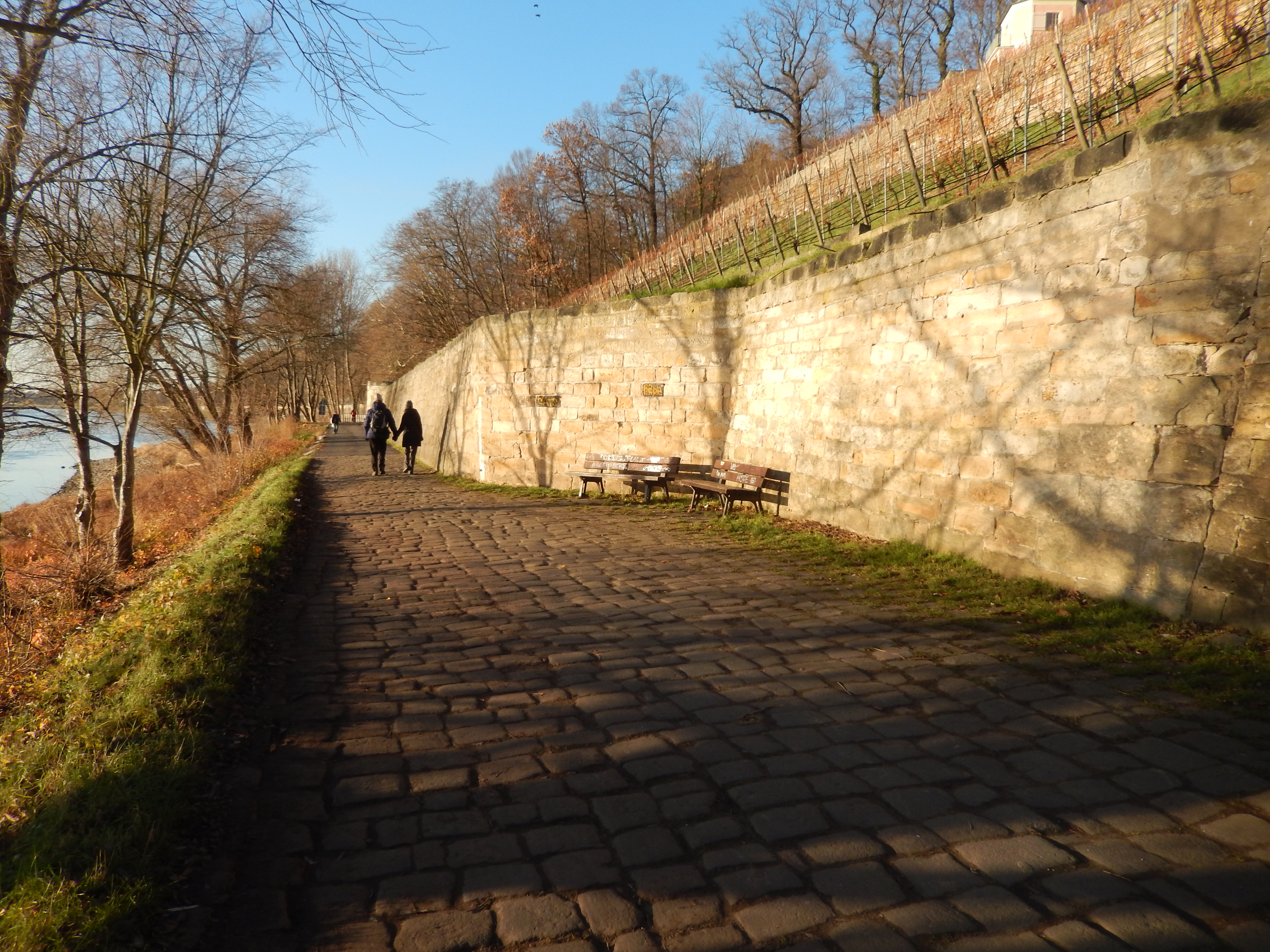 Dresden Körnerweg: Der Körnerweg entstand bereits vor dem Jahr 1700 und verband als Marktweg das Dorf Loschwitz mit der Stadt Altendresden (Dresdner Neustadt). Die Händler und Bauern brachten so ihre Erzeugnisse in die Stadt. Im Zeitalter der Industrialisierung benutzten die Bomätscher (Schiffszieher) den Weg zum Ziehen der Elbkähne. Der Weg wurde um 1908 verbreitert und endete an der Holzhofgasse. Heute wird er von Wanderern und Spaziergängern genutzt und ist Bestandteil des Elberadweges. Sanierung ist geplant. Blick Richtung Stadt. Ehemaliges Grundstück 28